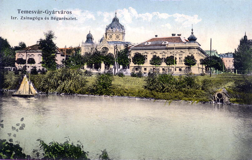 Sinagoga din Fabric - old postcard from 1909] Categorie:Imagini din Timişoara